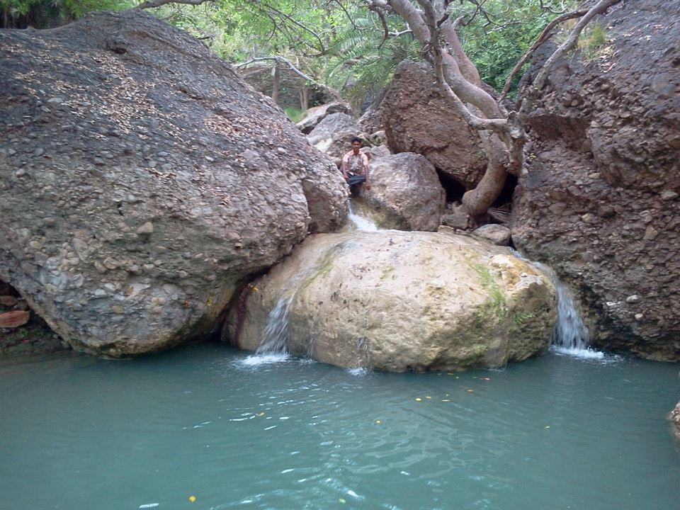 Alluru kona this is near from tadipatri mandal, anantapur district. one of the visting place in anantapur